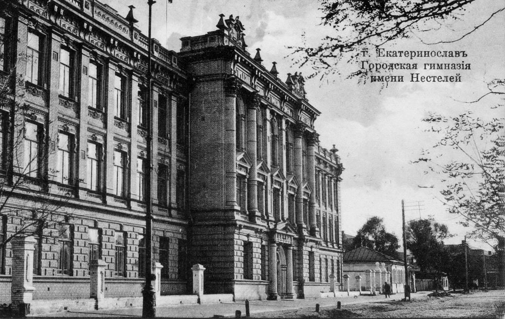 Жіноча гімназія на вулиці Московській, Катеринослав.